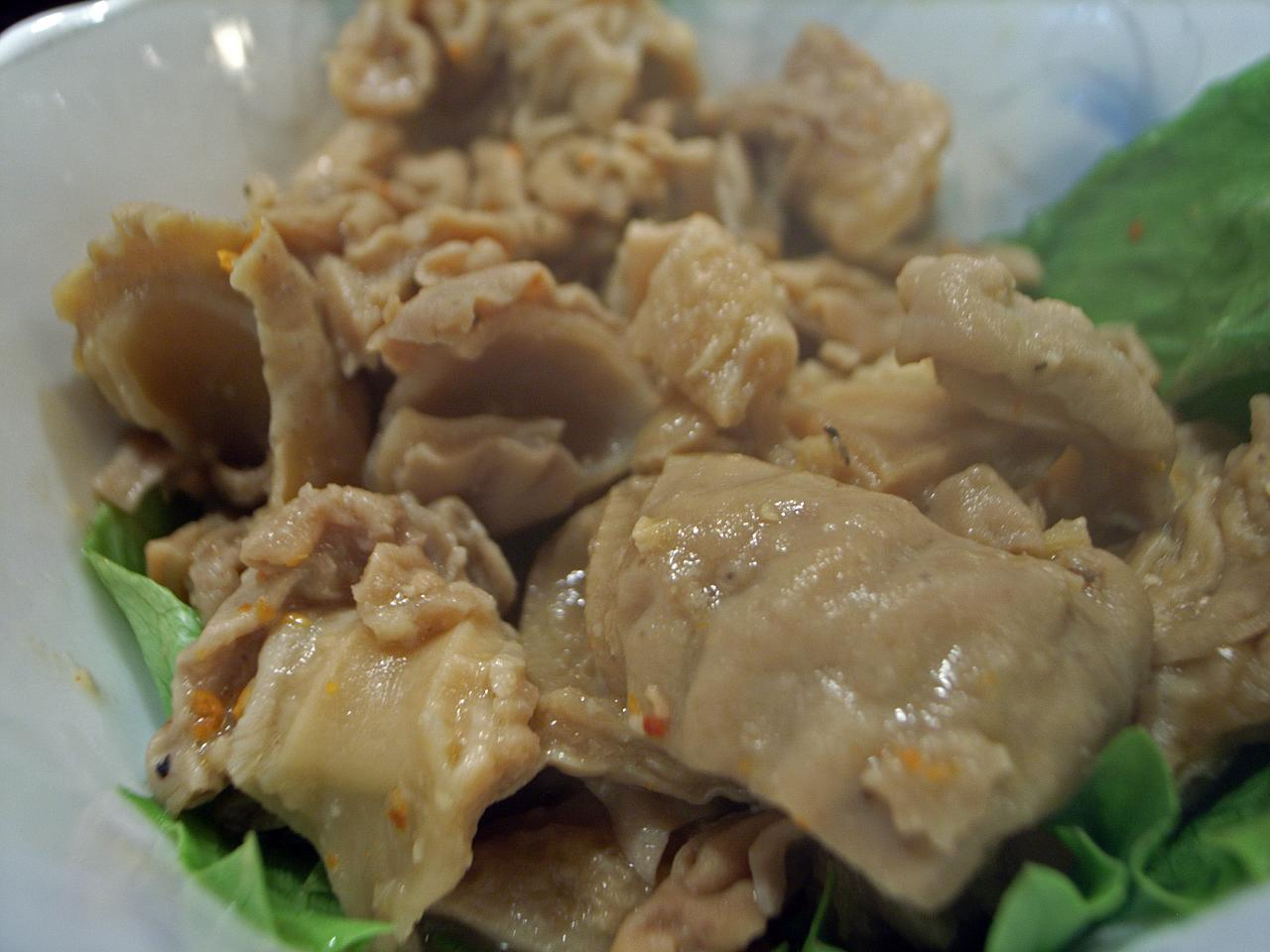 馬のホルモンの煮込み